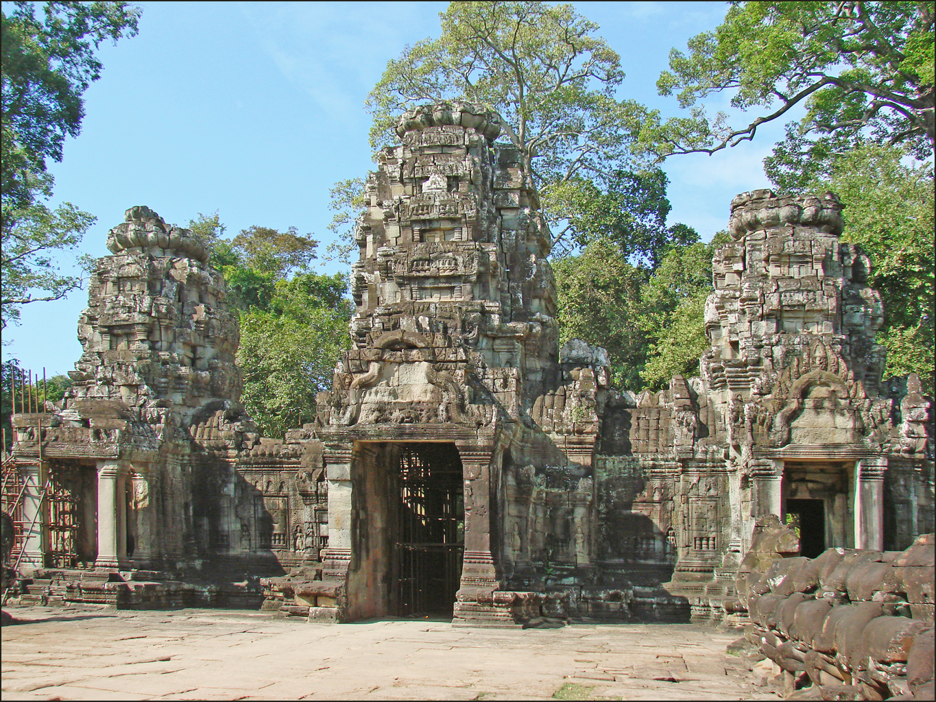 Gopura avec porche à pilastres _____________ Preah Khan (ou Prah Khan) est un temple construit sous le règne de Jayavarman VII (1181-1218), Il est consacré au culte bouddhique du Mahâyâna. Il a été inauguré en 1191. Preah Khan signifie "Epée sacrée", son nom d'origine est "capitale de la victoire" car il est construit sur le lieu de la bataille victorieuse des khmers contre les chams. Il est entouré d'une enceinte rectangulaire en latérite de 800 m sur 700 m, bordée de douves de 50 m. Les chaussées-digues, qui mènent aux bâtiments d'entrée : les gopura, sont ornées de géants gardiens, les bons Yaksha à gauche (Deva) et les mauvais Yaksha à droite (Asura). Ces derniers tiennent le serpent-Nâga qui sert de balustrade. Les représentations de Bouddha en méditation ont été buchées au XIIIè siècle par des fanatiques hindouistes. La tour-sanctuaire centrale abritait la statue du dieu bouddhiste Lokeshvara, en mémoire du père du roi. Les hindouistes auraient remplacé cette statue par un linga